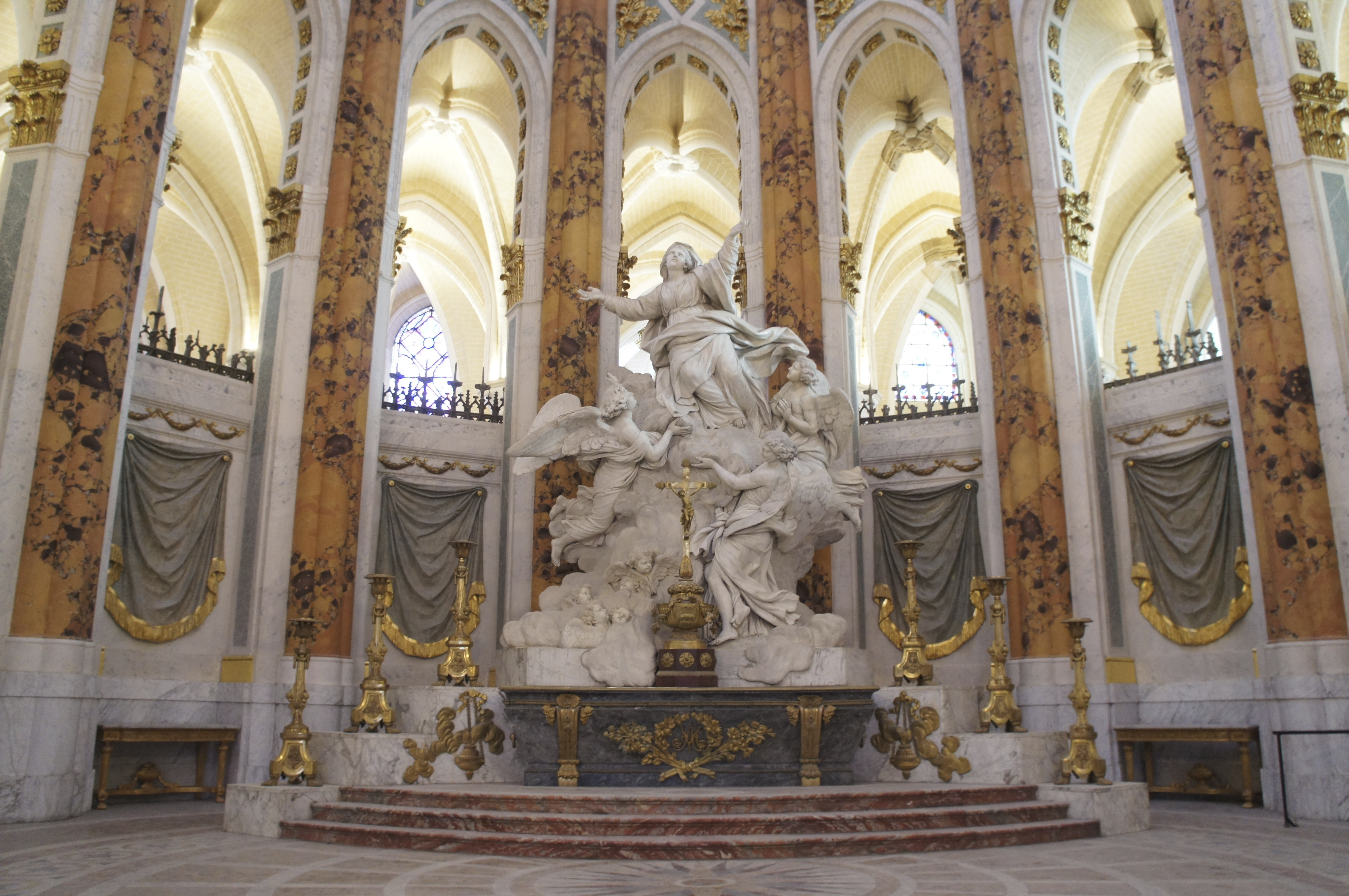 Cathédrale de Chartres - Choeur